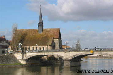 Eglise Saint Maurice de Sens (Yonne).